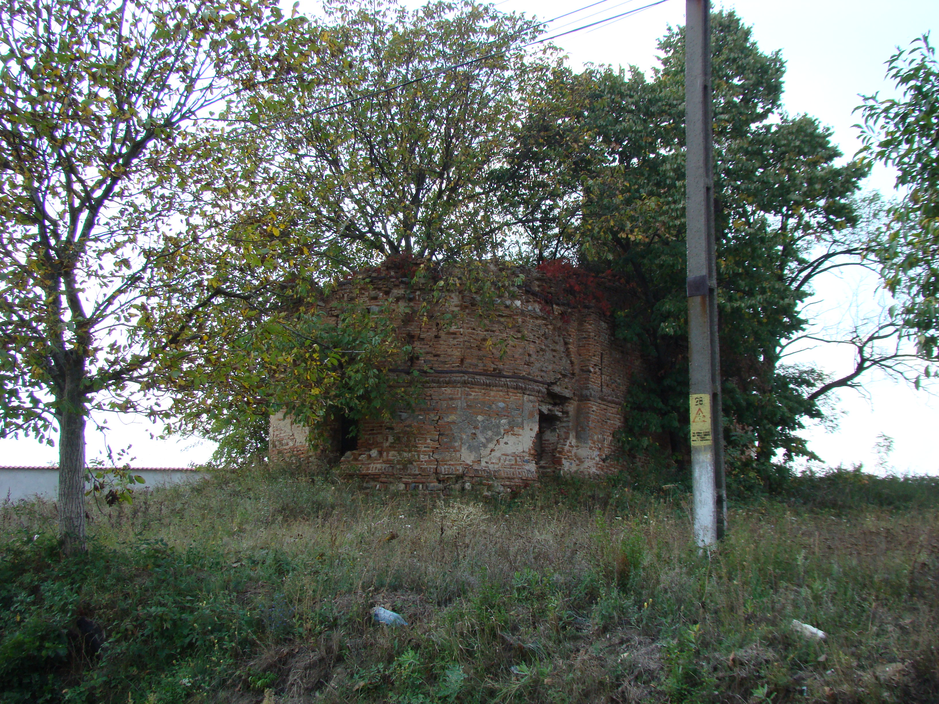 Ruinele bisericii „Sf. Grigore Teologul” din Bălănești, Gorj